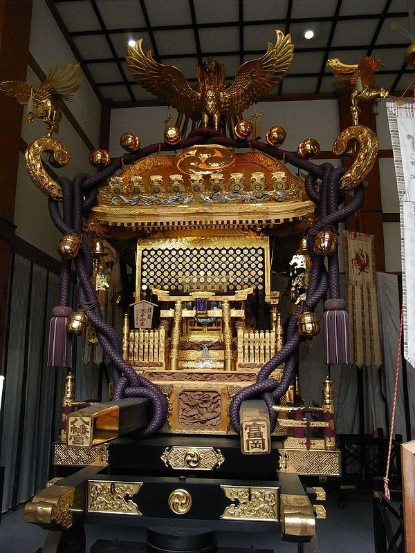 友岡八幡宮